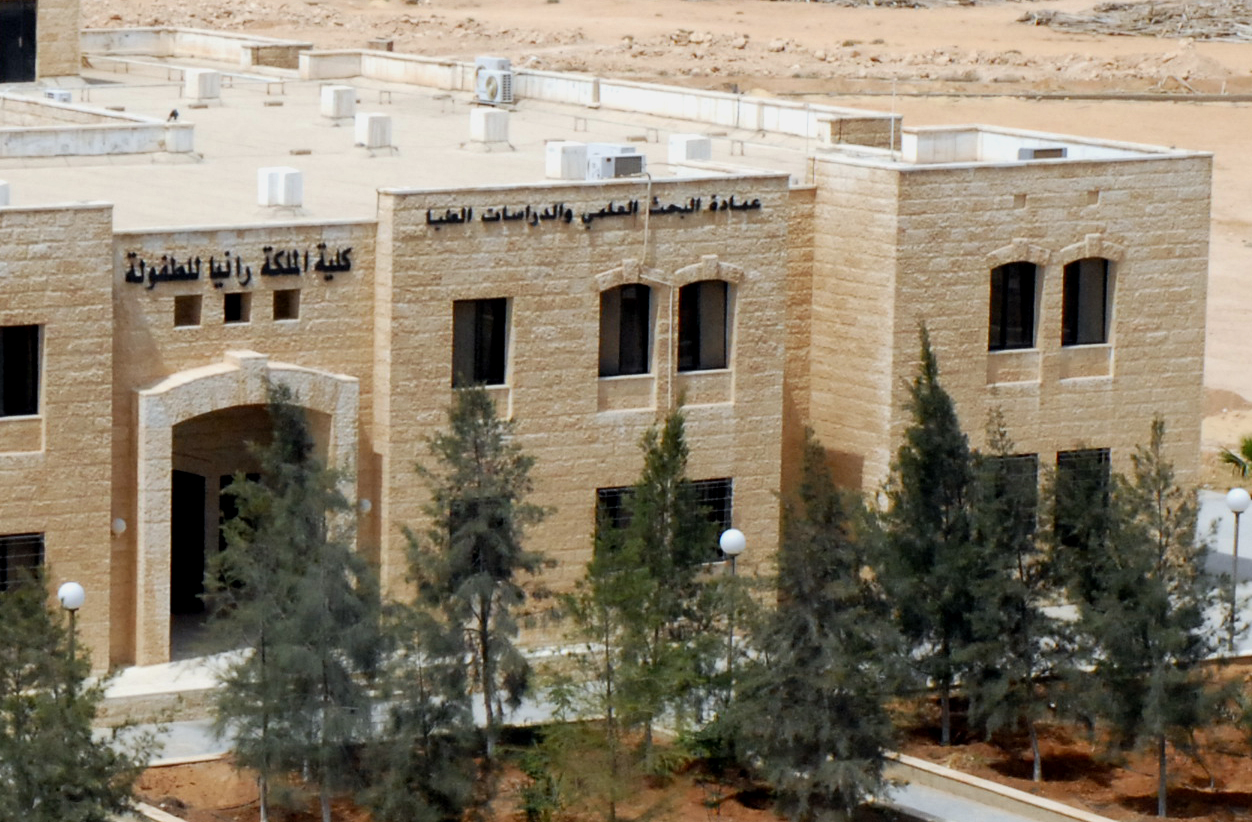 صور للجامعة